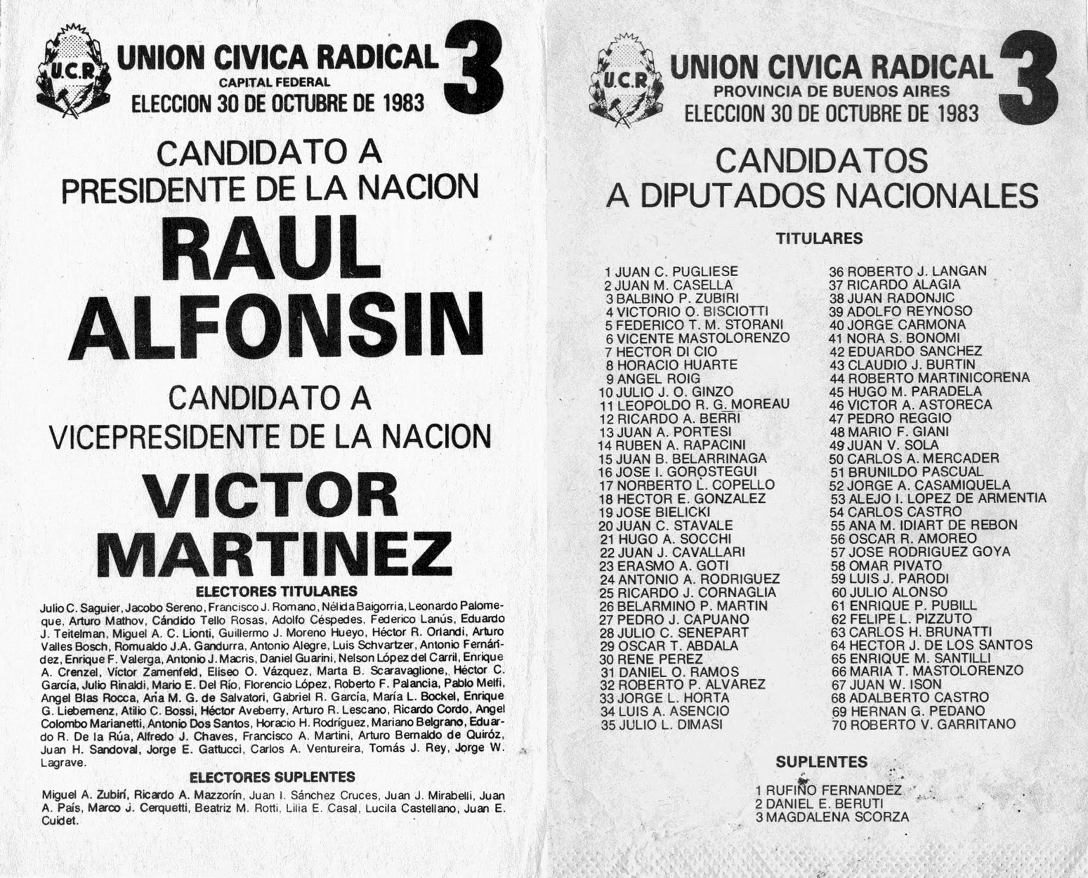 Boleta electoral de la Unión Cívica Radical en 1983, con Raúl Alfonsín como candidato a presidente. El mismo se impondría en dichos comicios. Foto de copia conservada en el Museo Histórico Nacional